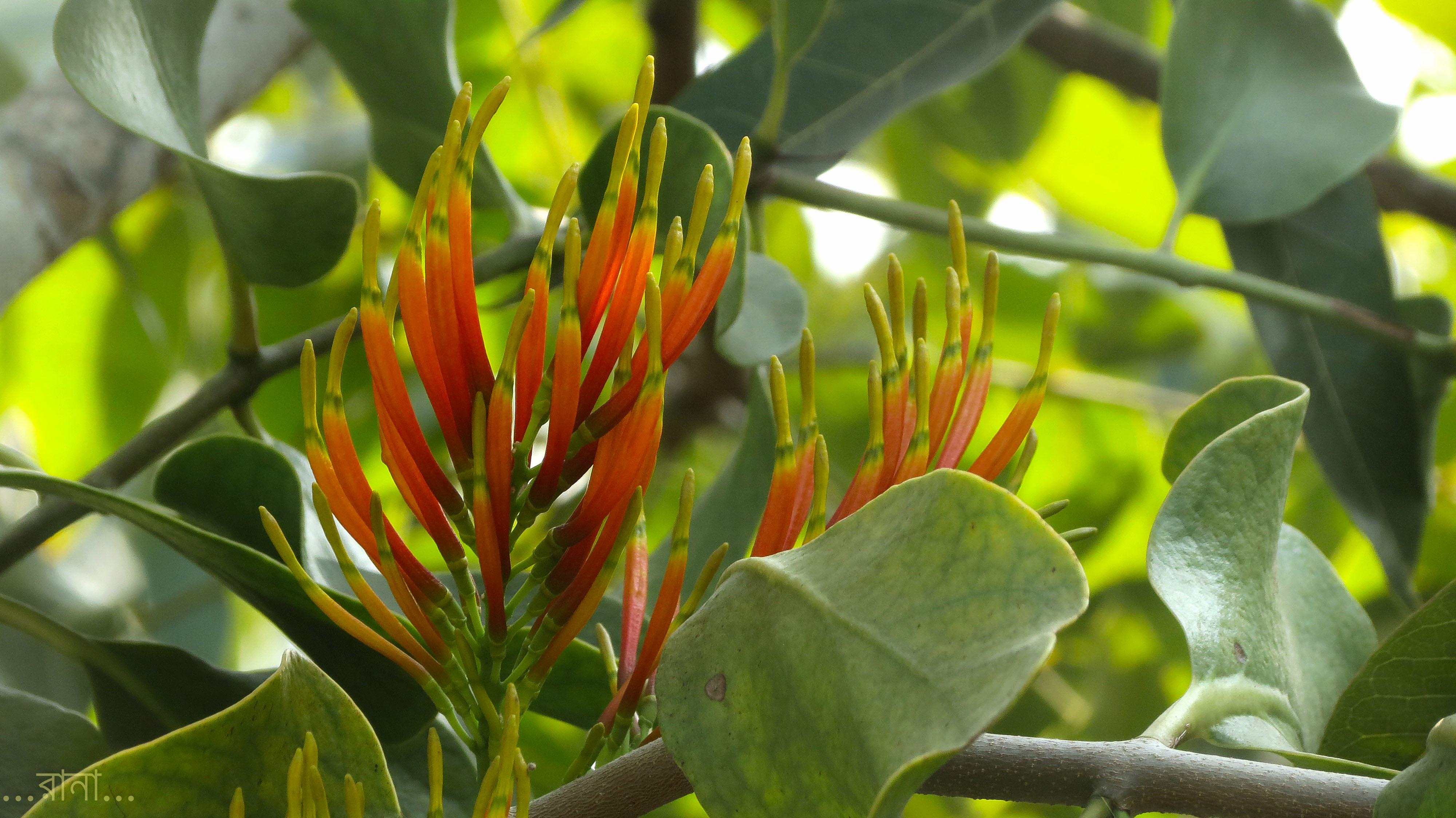 ধাইরা ফুল। এটি মেহগিনি গাছে হয়েছে।